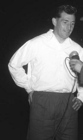 Title: SC Wismut gegen 1. FC Kaiserslautern Factual corrections and alternative descriptions are encouraged separately from the original description. Additionally errors can be reported at this page to inform the Bundesarchiv. Original historic description: Zentralbild/Franck/Opitz 7.10.1956 SC Wismut Karl-Marx-Stadt unterlag 1. F.C.Kaiserslautern 5:3 Der 2. Fussballgrosskampf am gestrigen Sonnabend, dem 6.10.1956, zwischen dem 1. F.C.Kaiserslautern und dem SC Wismut Karl-Marx-Stadt unter Tiefstrahlern im Leipziger Zentralstadion wurde ein Triumph vor hunderttausend Zuschauer der Lauterer. UBz: Der Mannschaftskapitän der Lauterer Fritz Walter gibt dem Deutschen Fernsehzentrum ein Interview.